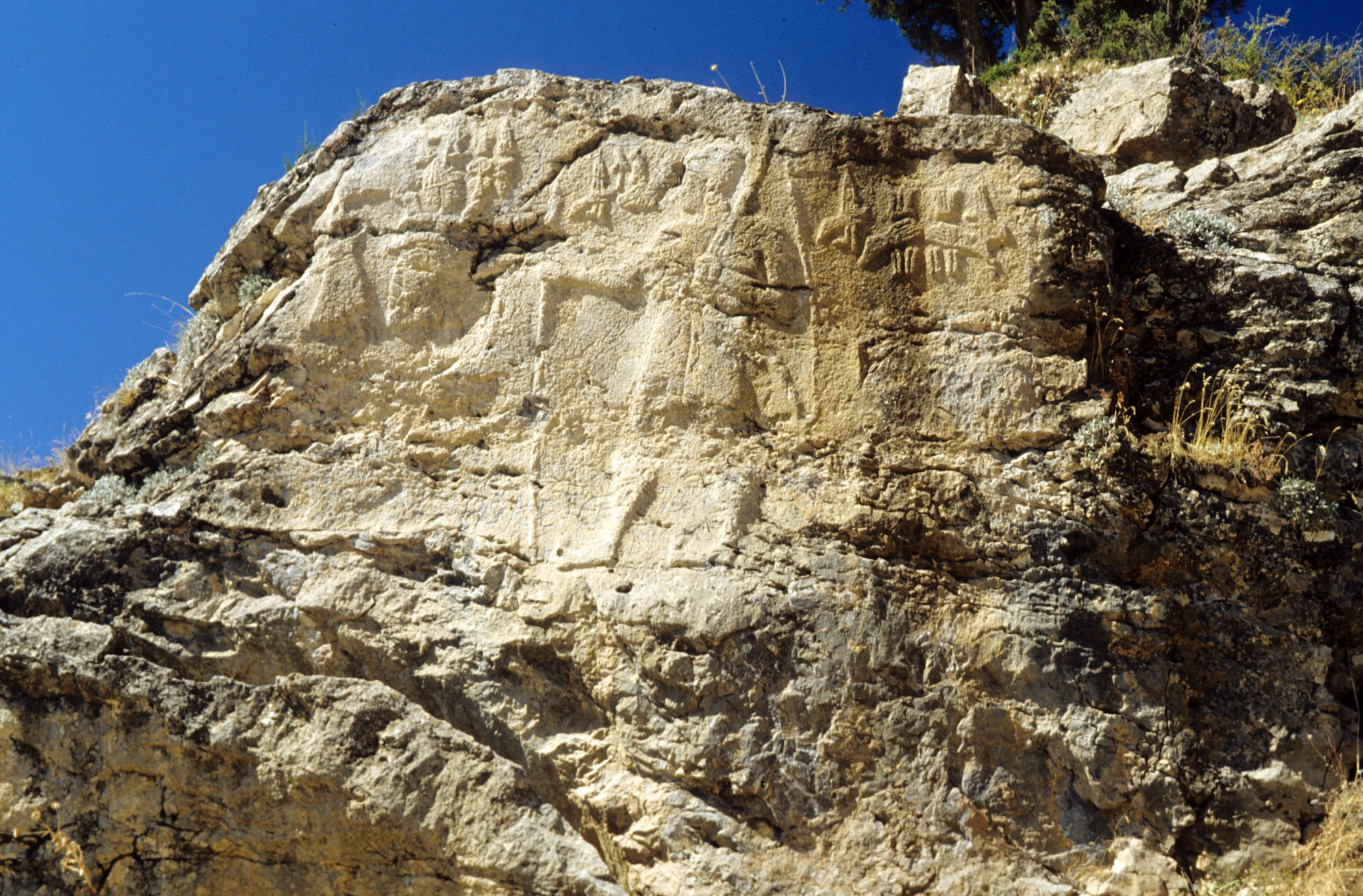 Hethitisches Relief von Hanyeri, Türkei